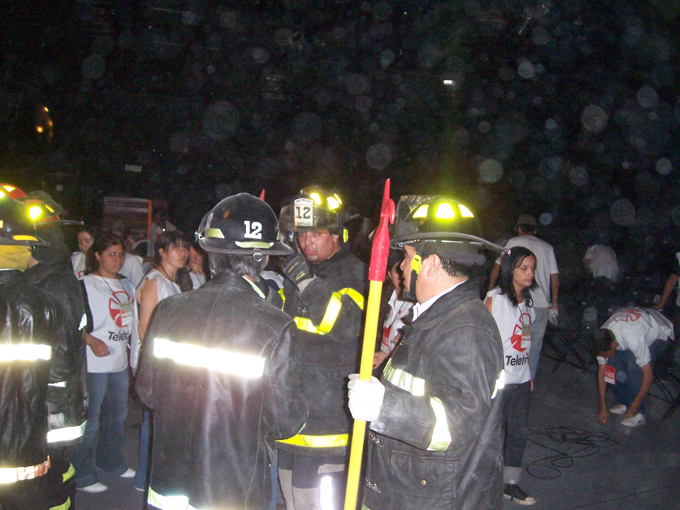 Amago de Incendio en Evento Teleton Chile 2007